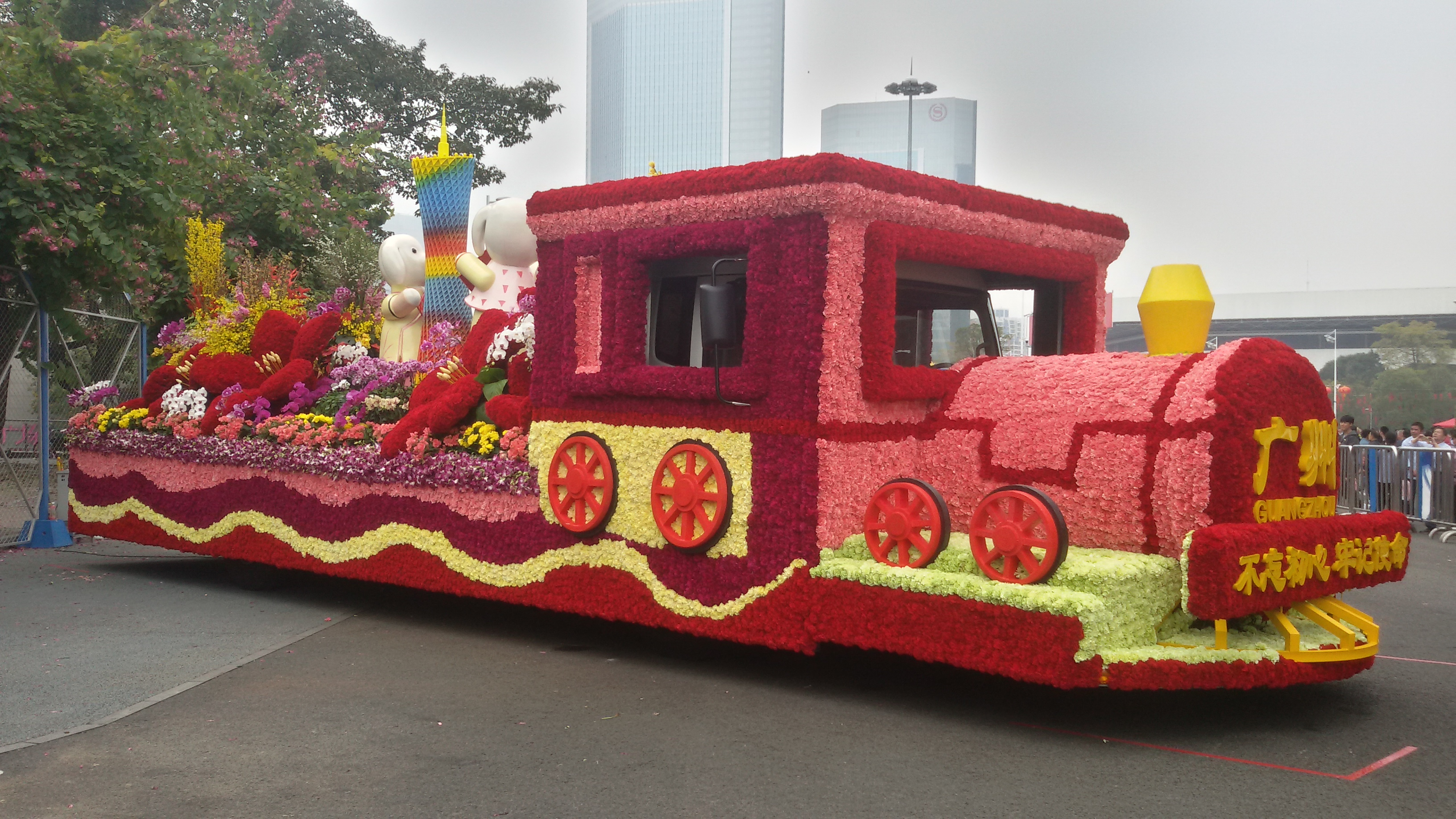 粵語: 第一屆廣州春節花車巡遊嘅花車——廣州主會團